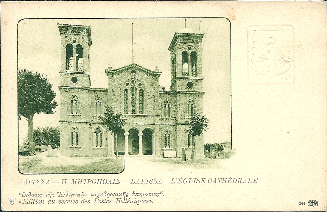 Larissa (Grèce) - L'église cathédrale -1918